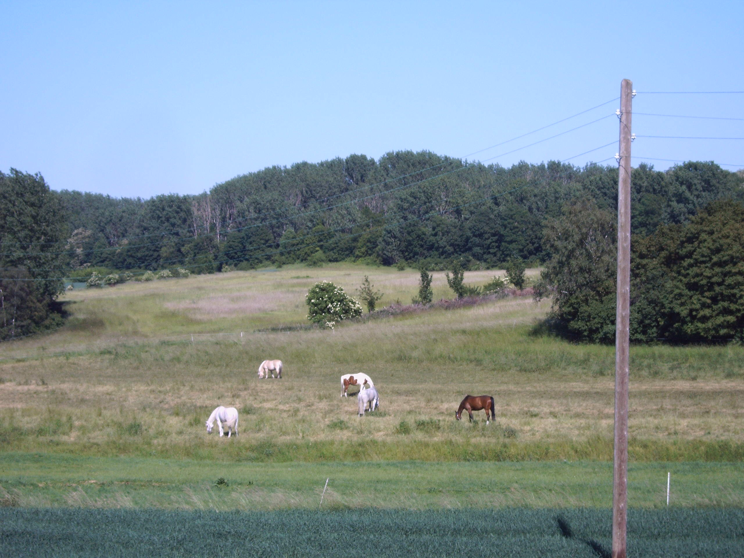 Sohlener Berge in Magdeburg Bild aufgenommen am 11.6.2006